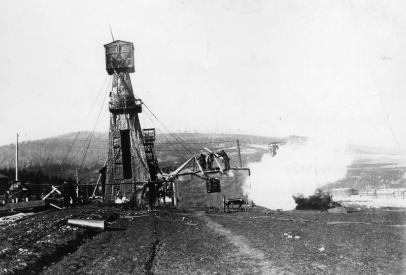 Boryslaw, Erdölgewinnung ADN-ZB/Archiv Rußland 1909 Bohrtürme auf den Ölfeldern von Boryslaw in Galizien. [Scherl Bilderdienst]